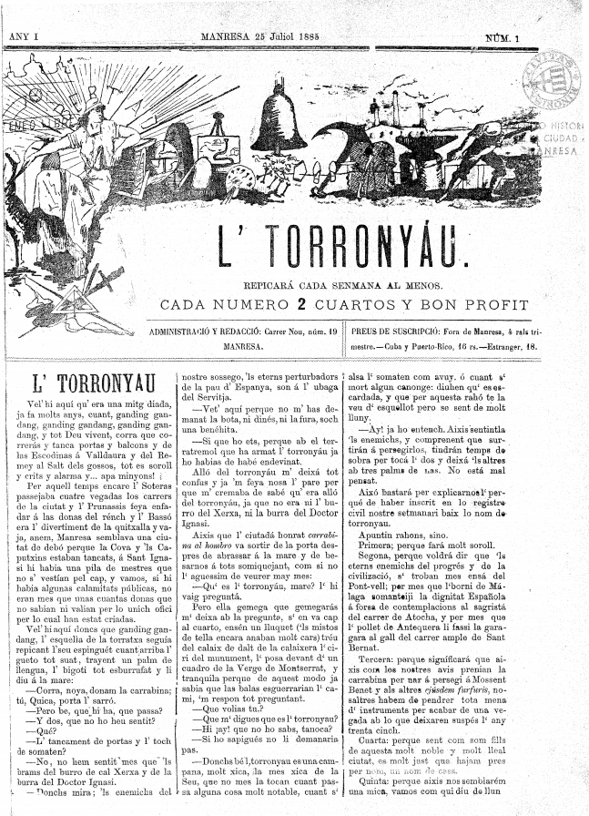 Portada del primer número de Lo Torronyau